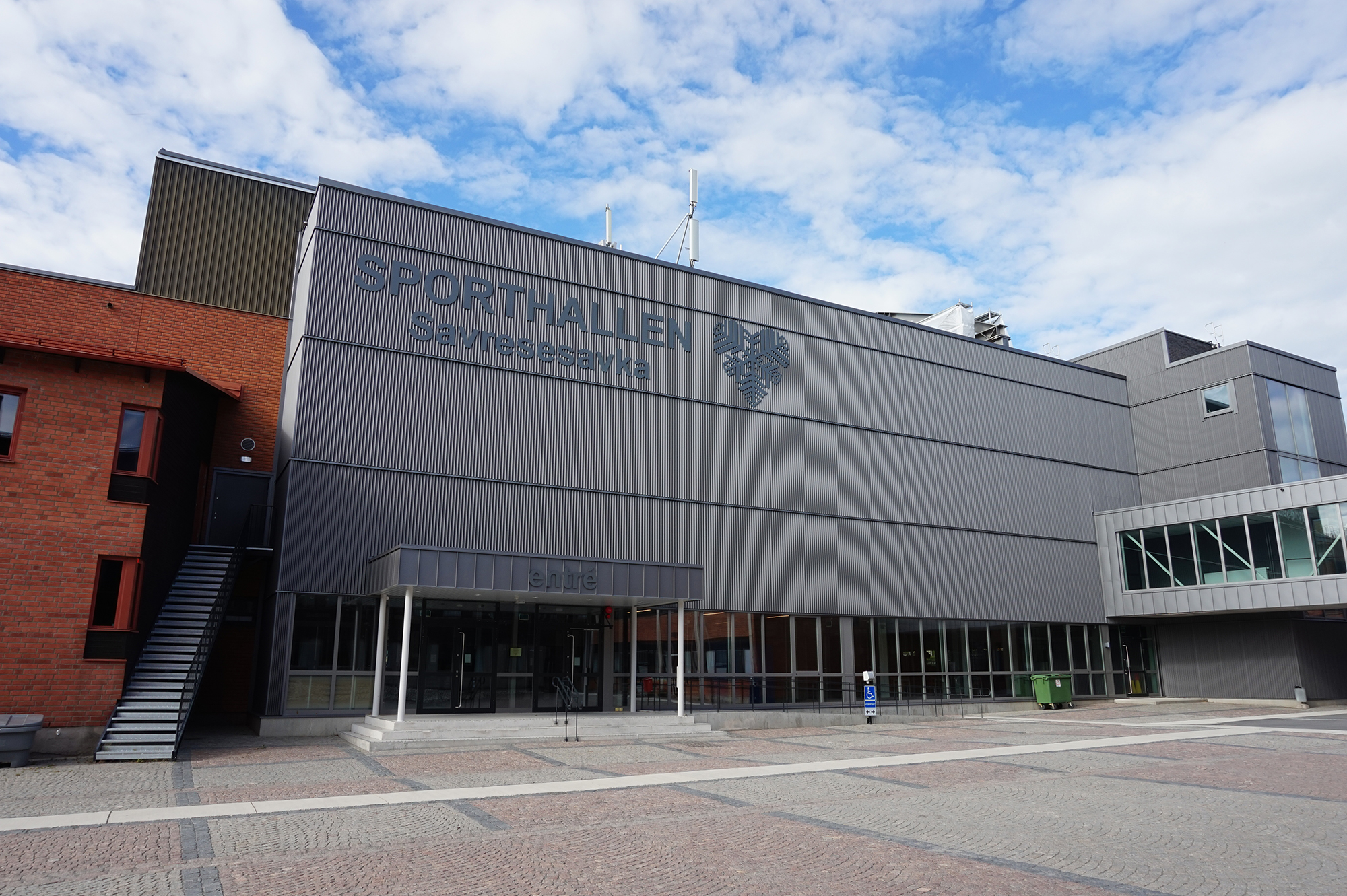 Sporthallen Östersund Sommaren 2017